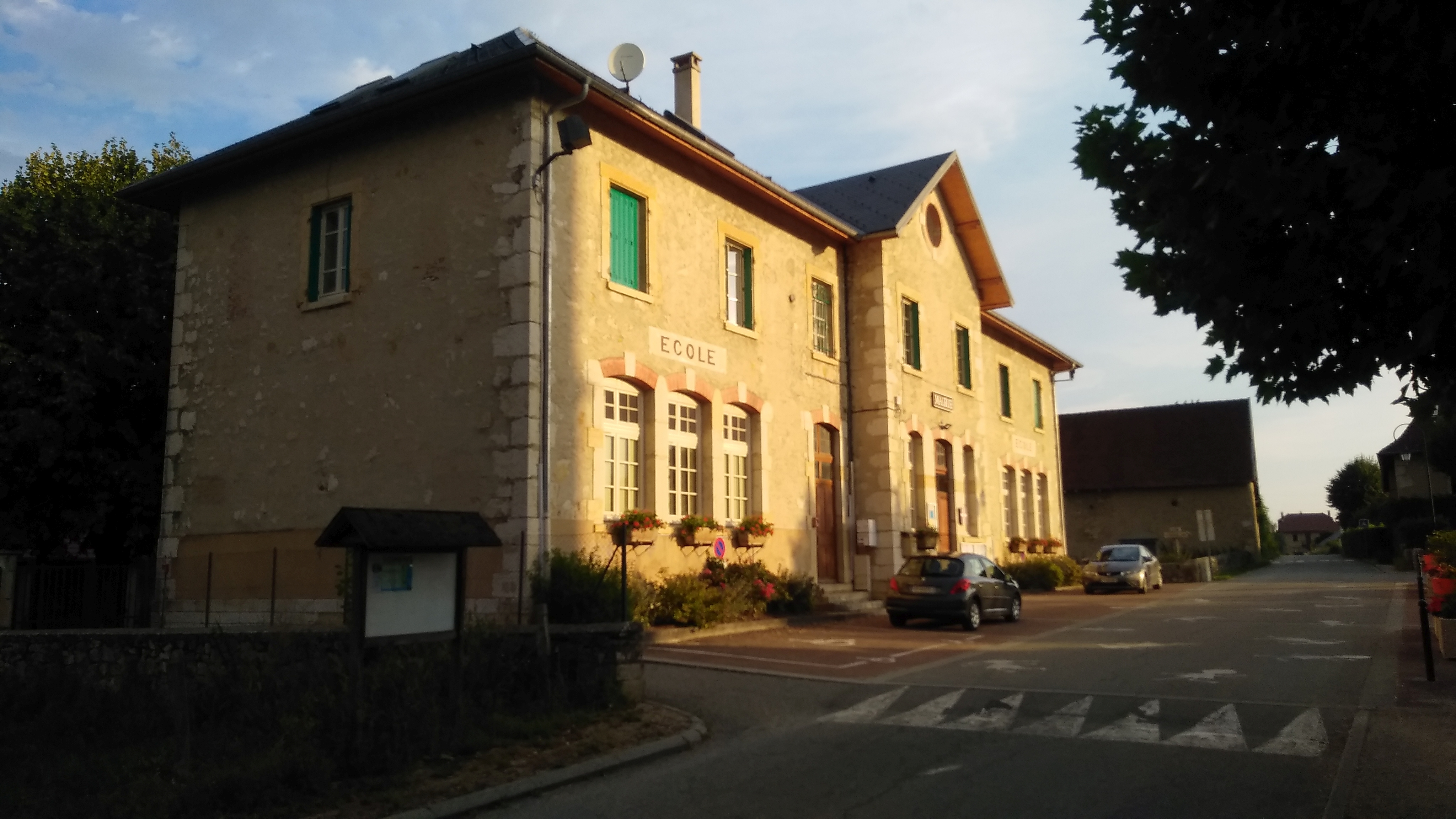 Ayn (Savoie): la mairie